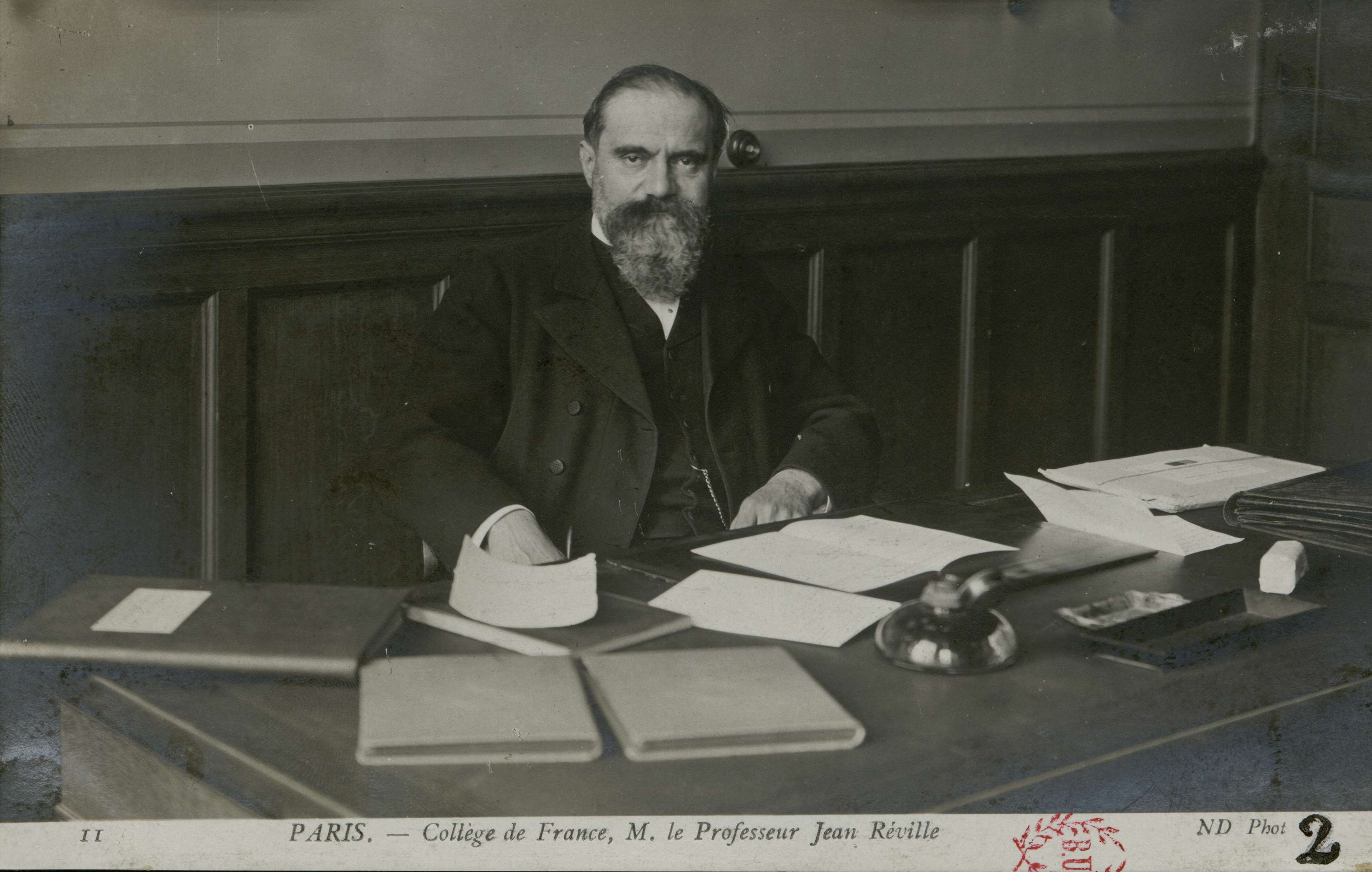 Carte postale photographique